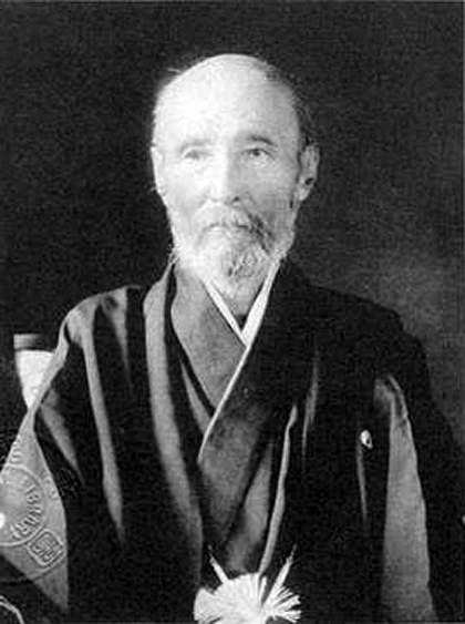 伊庭貞剛（1847-1926）の肖像。（伝記『幽翁』掲載）